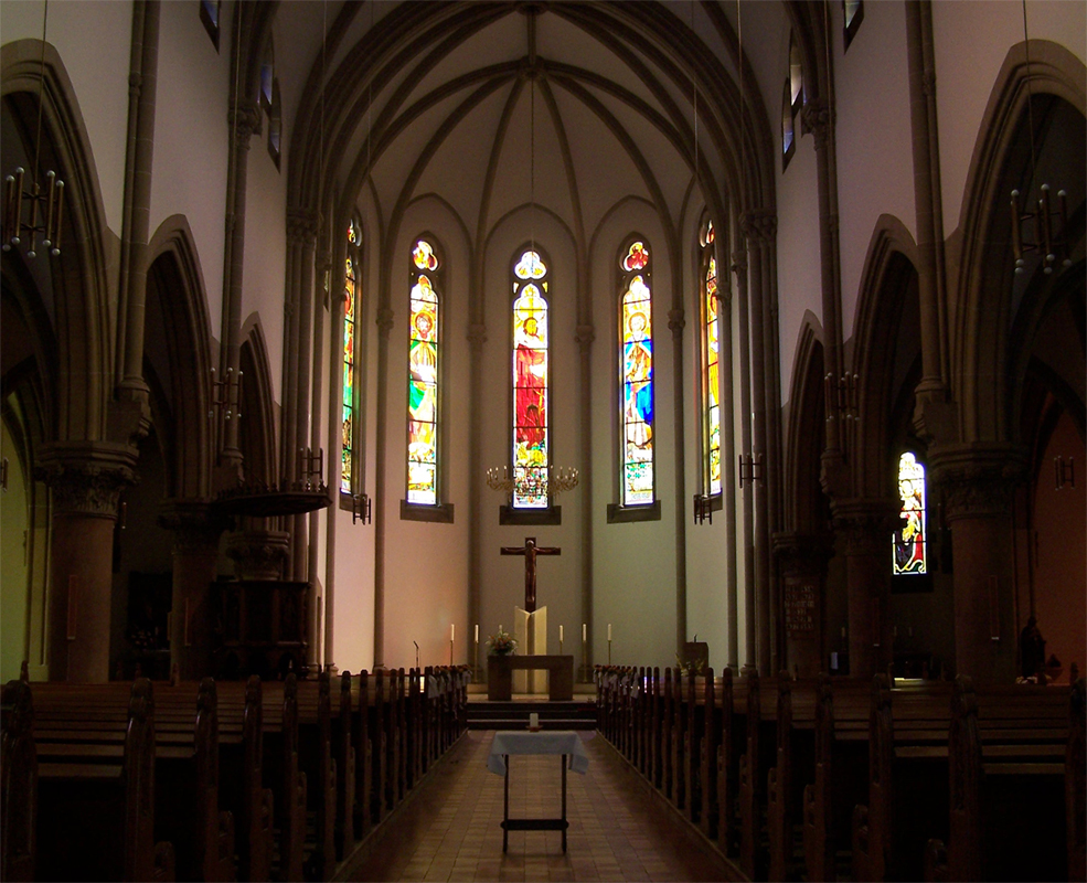 Innenraum mit Blick auf den Altarraum der Herz-Jesu-Kirche, Dresden